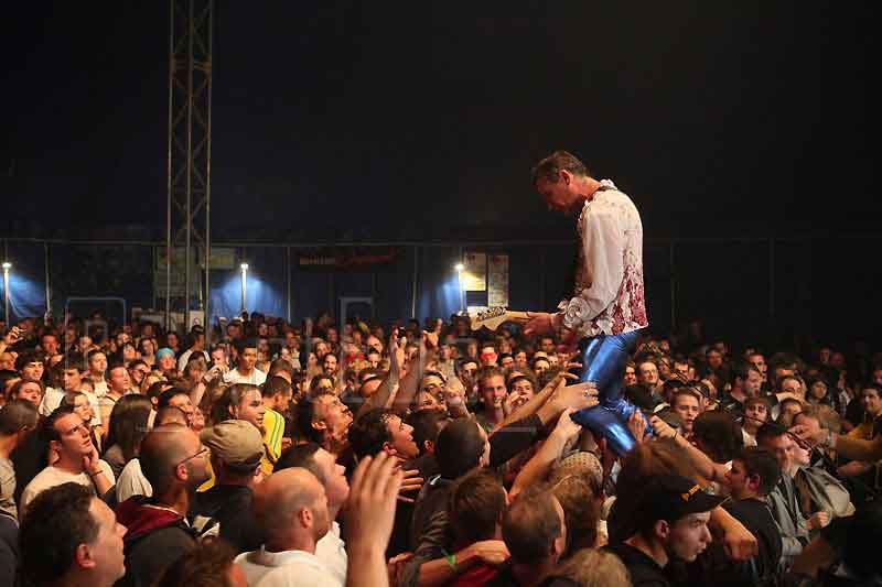 Les Vampas à La Poule des Champs